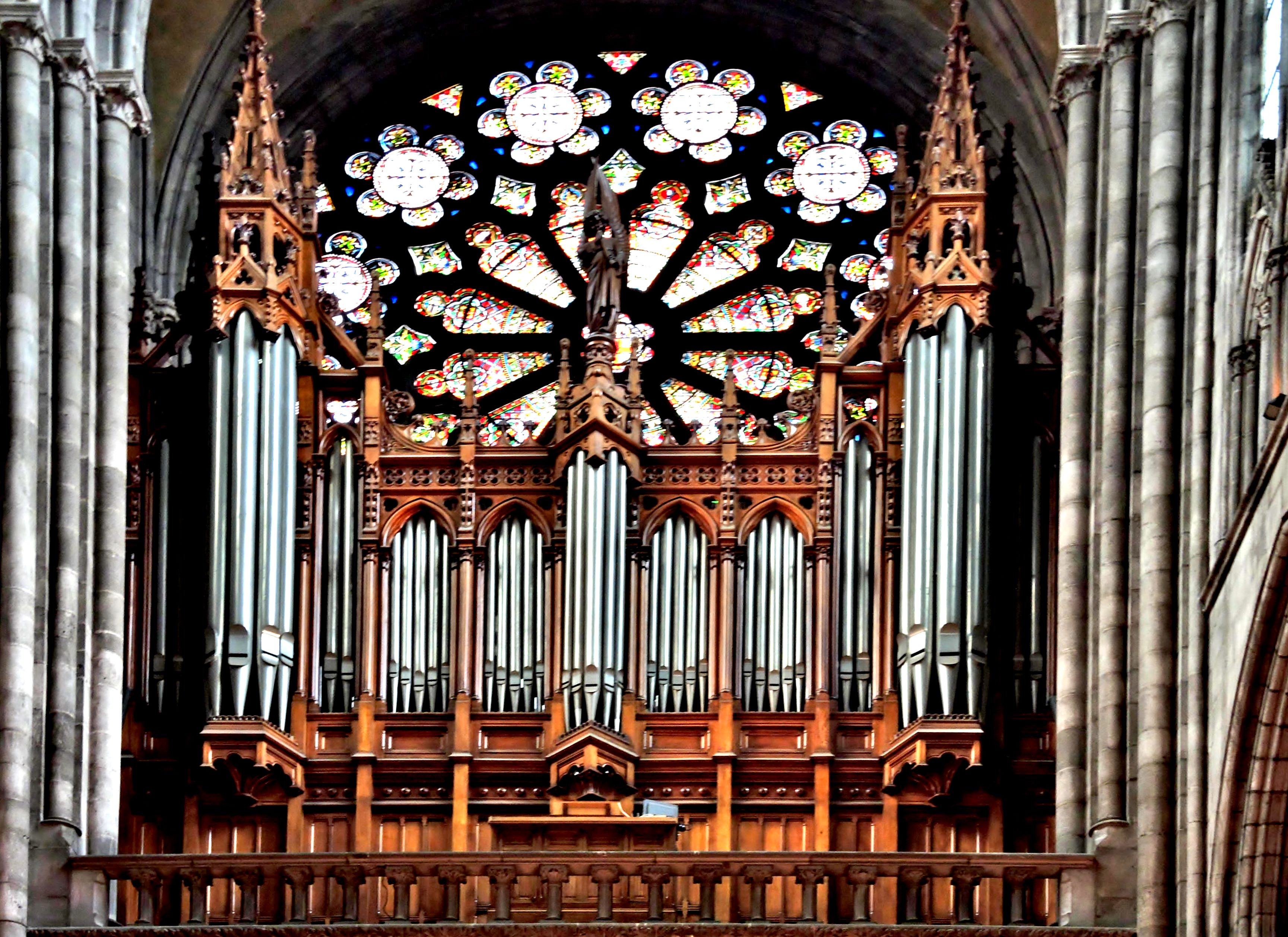 Orgue devant la rosace ouest de la cathédrale de Clermont-Ferrand. Puy-de-Dôme